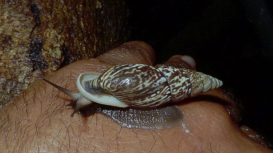 Burringtonia exesa (Spix, 1827)